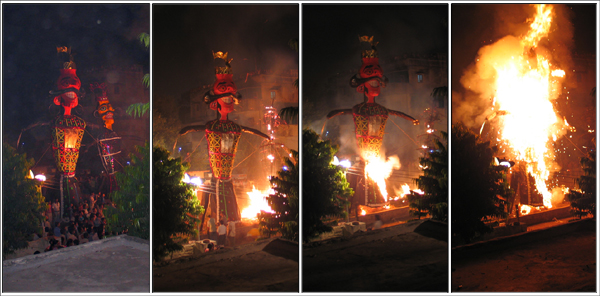 Fête de Dusshera - Delhi 10-2006 / Dusshera Festival - Delhi 10-2006